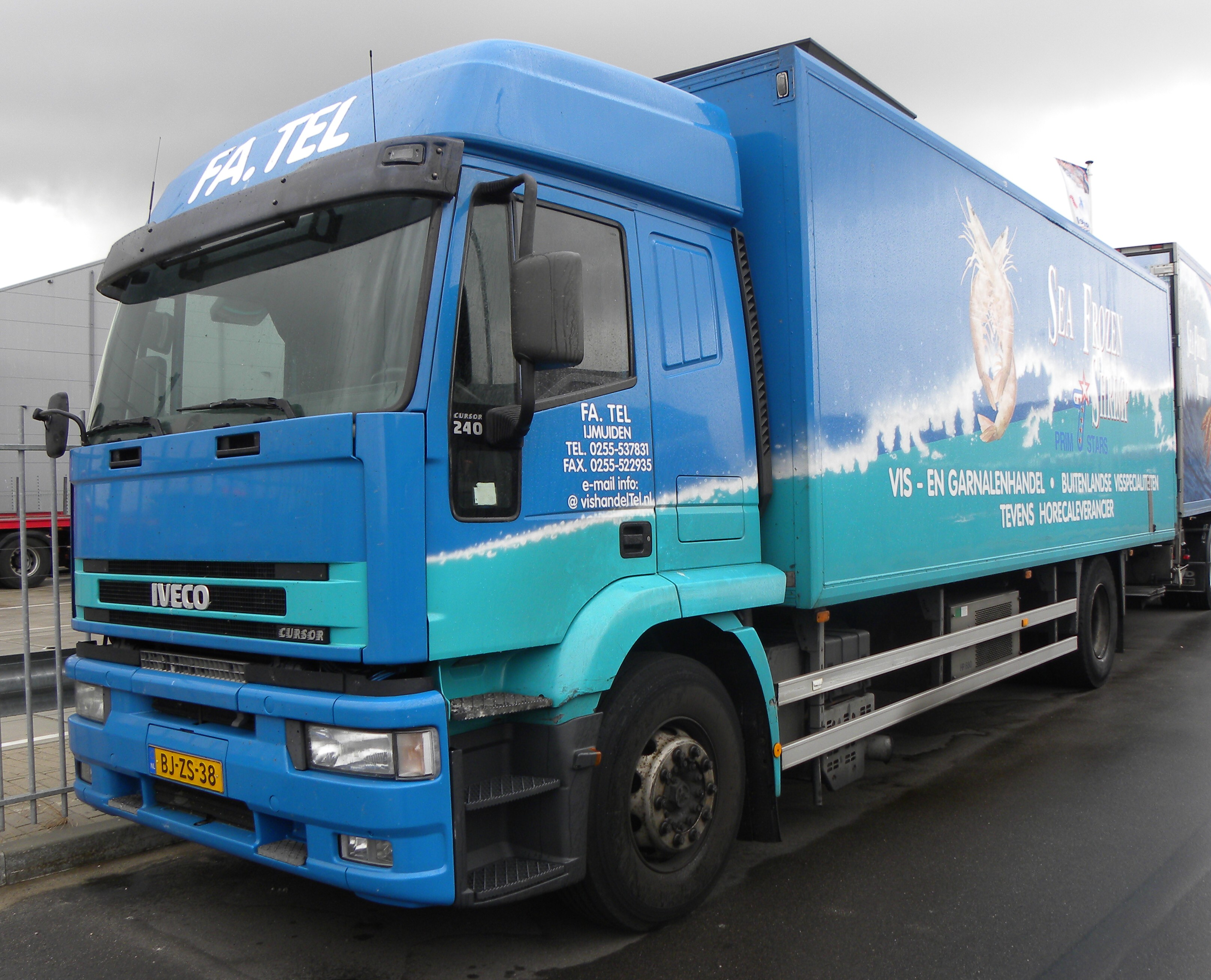 Iveco 240 Cursor Vishandel TEL Vis- en Garnalenhandel Buitenlandse Visspecialiteiten tevens Horecaleverancier.